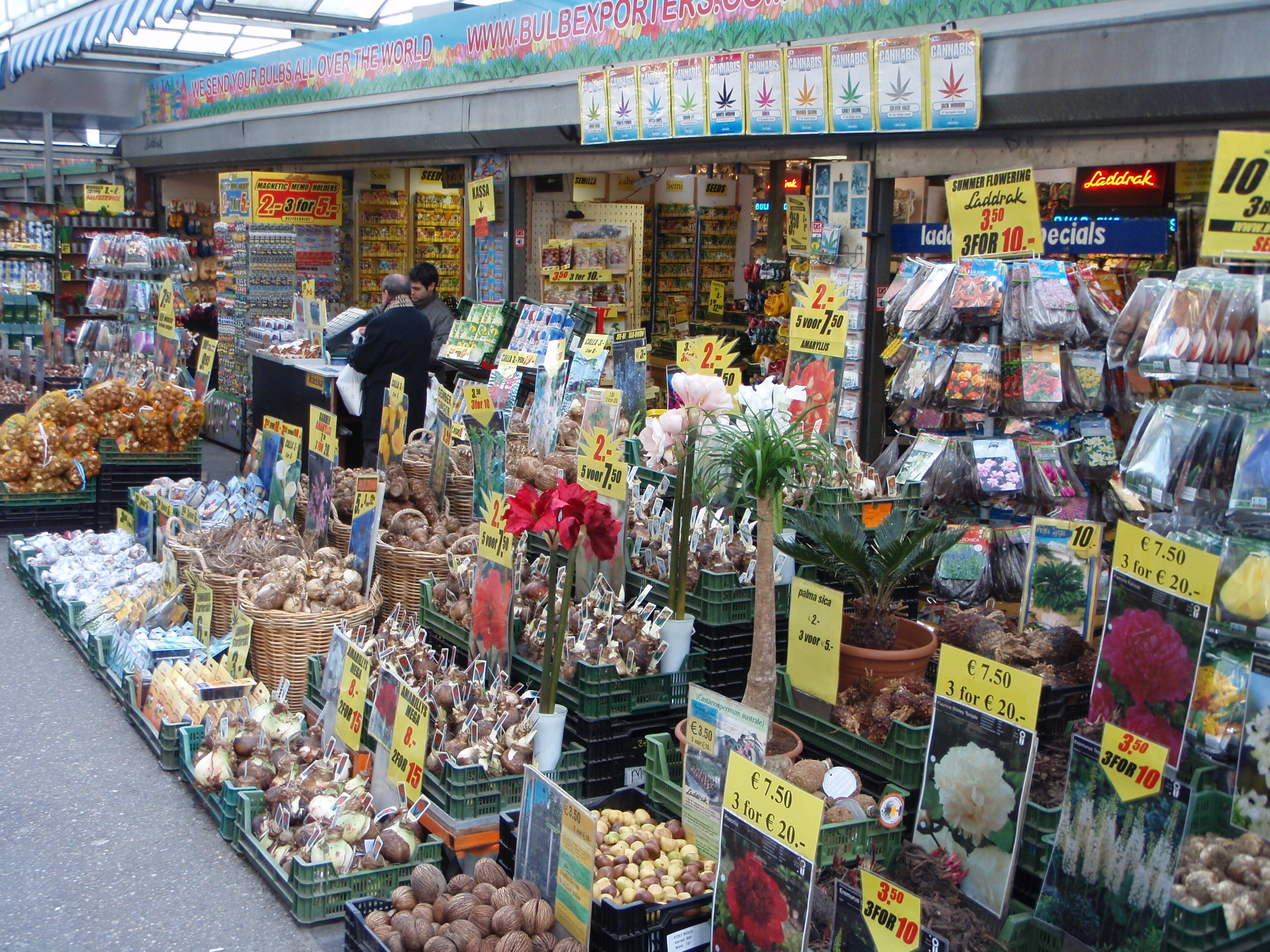 Amsterdam Bloemenmarkt 4